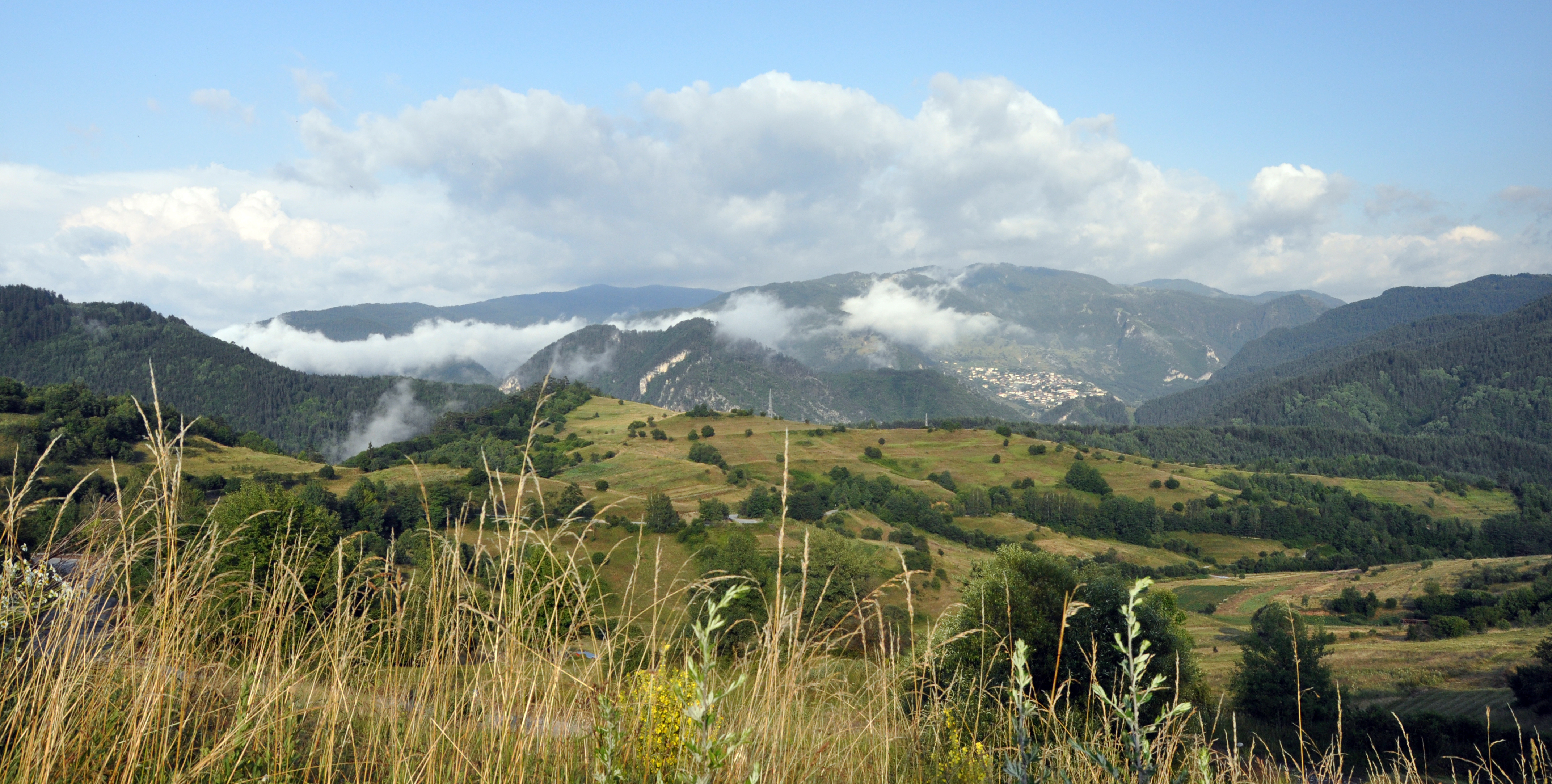 панорама над с. Гьоврен Template:Panorama over the village of Gyovren, Bulgaria